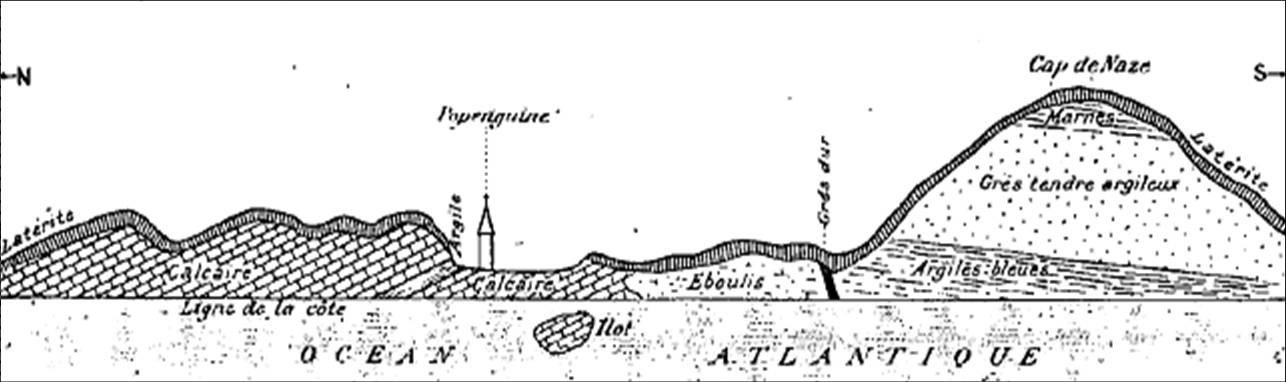 Coupe géologique Nord-Sud : "Coupe de Popenguine au cap de Naze", dans La Géographie, tome IV, 15 juillet 1901, p. 14